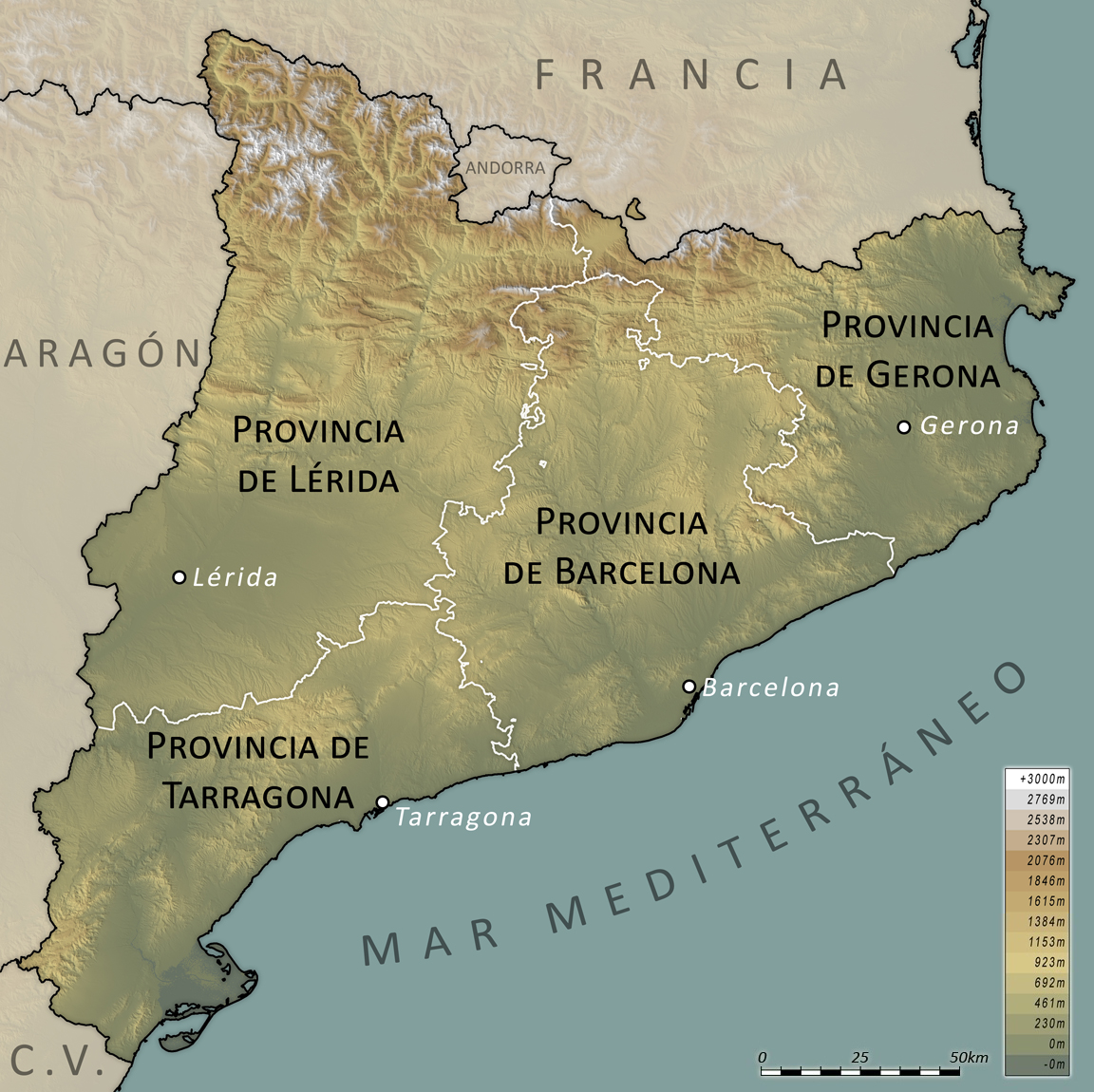 Mapa provincial de Cataluña. Por Hansen